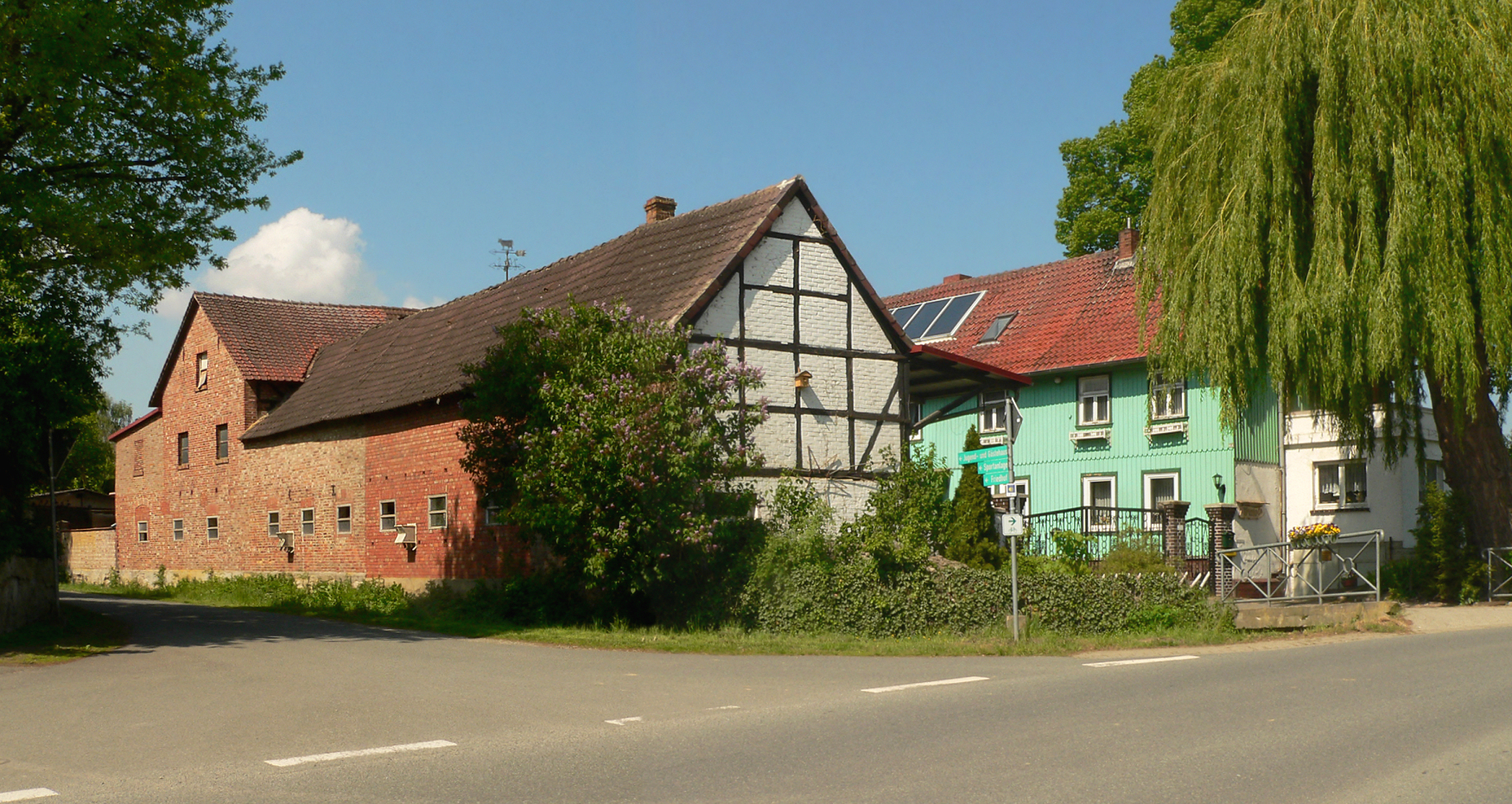 Mönchsmühle in Räbke, heute Hof Rosenblatt